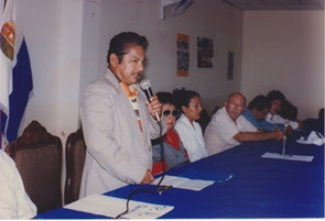 Eladio Criollo, compositor del Himno al Cantón Playas